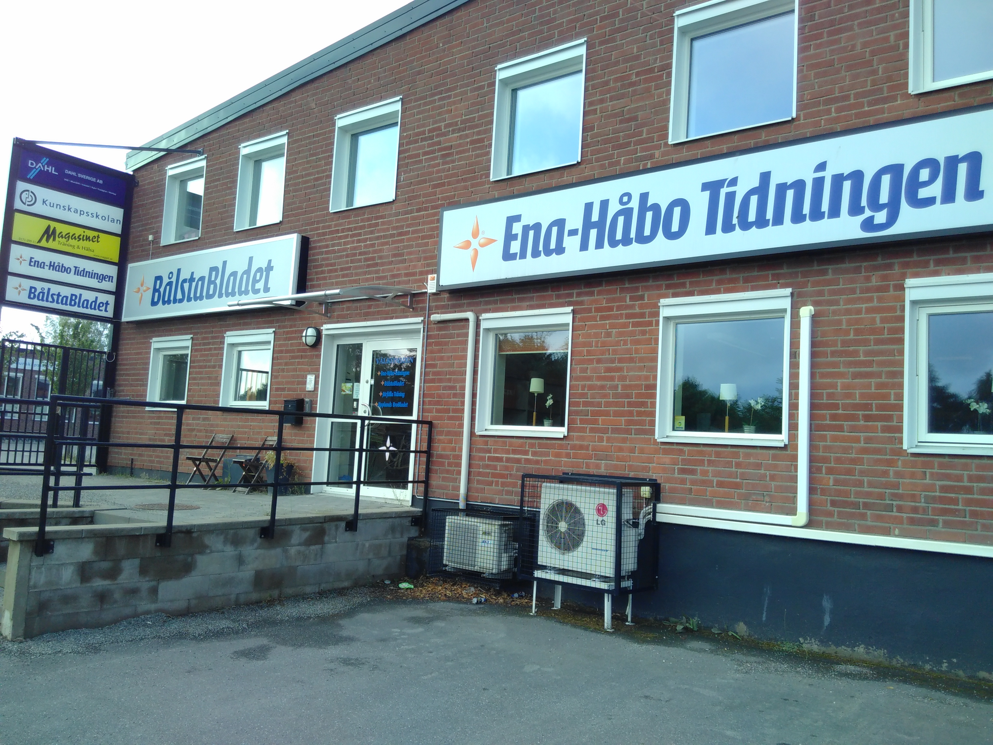 Bålstabladet och Ena-Håbotidningens redaktion i Enköping.